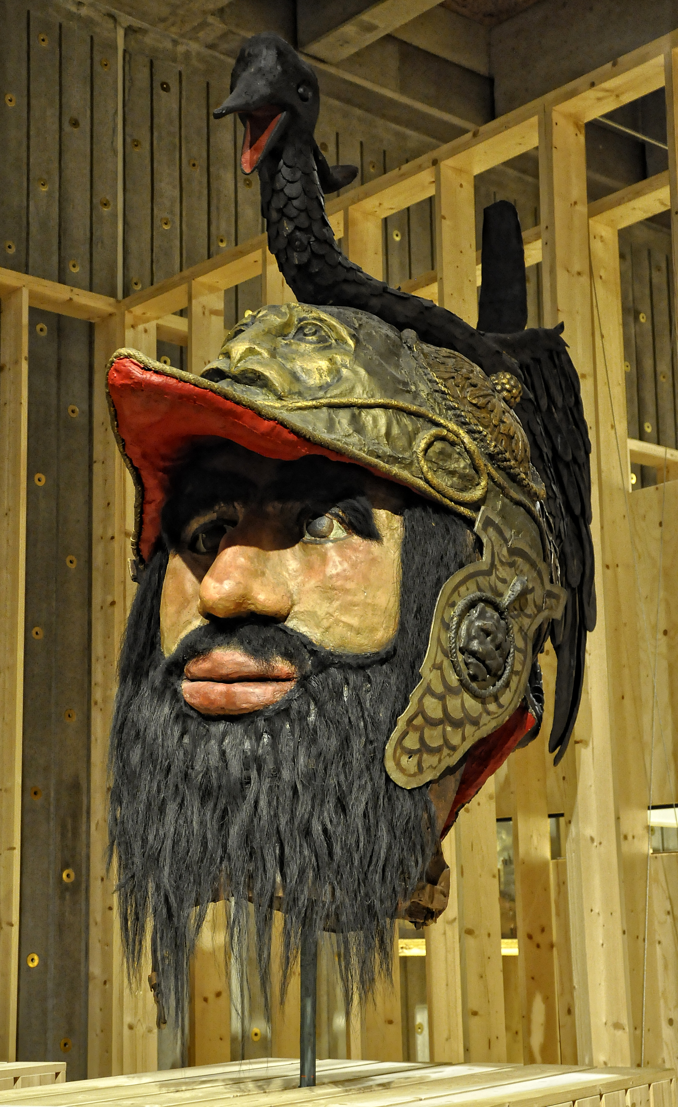 Het hoofd van de reus Druon Antigoon in het MAS - vervaardigd door Pieter Coecke van Aelst (1502-1550) - gemaakt in 1534-1535 uit papier-maché, touw, metaal en haar